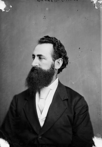 Amor de Cosmos